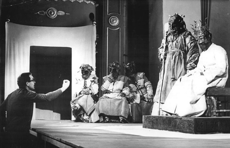 Berlin, Proben "Ödipus Tyrann", Besson, Düren, Hiemer Zentralbild-Hochneder 23.2.1967 Berlin: "Ödipus Tyrann" im Deutschen Theater aufgeführt. Regisseur Benno Besson (links) während der Probearbeiten zu "Ödipus Tyrann" nach Hölderlin von Heiner Müller. Fred Düren spielt den "Ödipus" rechts, Horst Hiemer den "Teiresias" (links neben Düren). Das Stück hatte am 31.1.1967 im Deutschen Theater Premiere. Regie führt Benno Besson, Bühnenbild und Kostüme entwarf Horst Sagert. Abgebildete Personen: Besson, Benno: Theaterregisseur, Schweiz (GND 118662597) Düren, Fred: Schauspieler, DDR (GND 118527851) Hiemer, Horst: Schauspieler, DDR (GND 128613866)